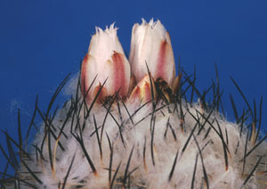 Turbinicarpus saueri aus der Sammlung von „Andreae Kakteenkulturen“, Inh. Michael Januschkowetz, Ausserhalb Lengfeld 17, 64853 Otzberg-Lengfeld